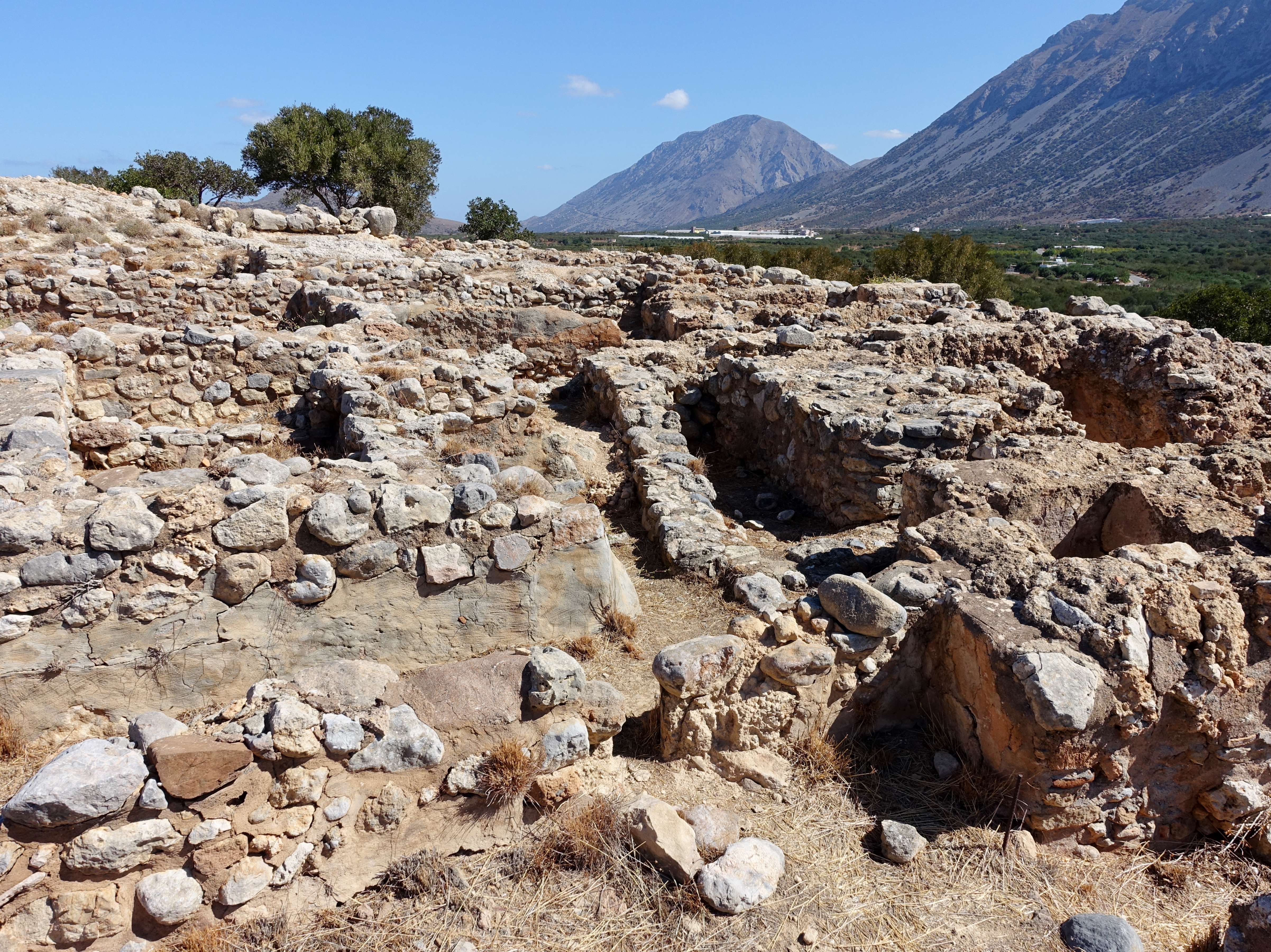 Ausgrabungsstätte Vassiliki (Βασιλική), Gemeinde Ierapetra, Kreta, Griechenland